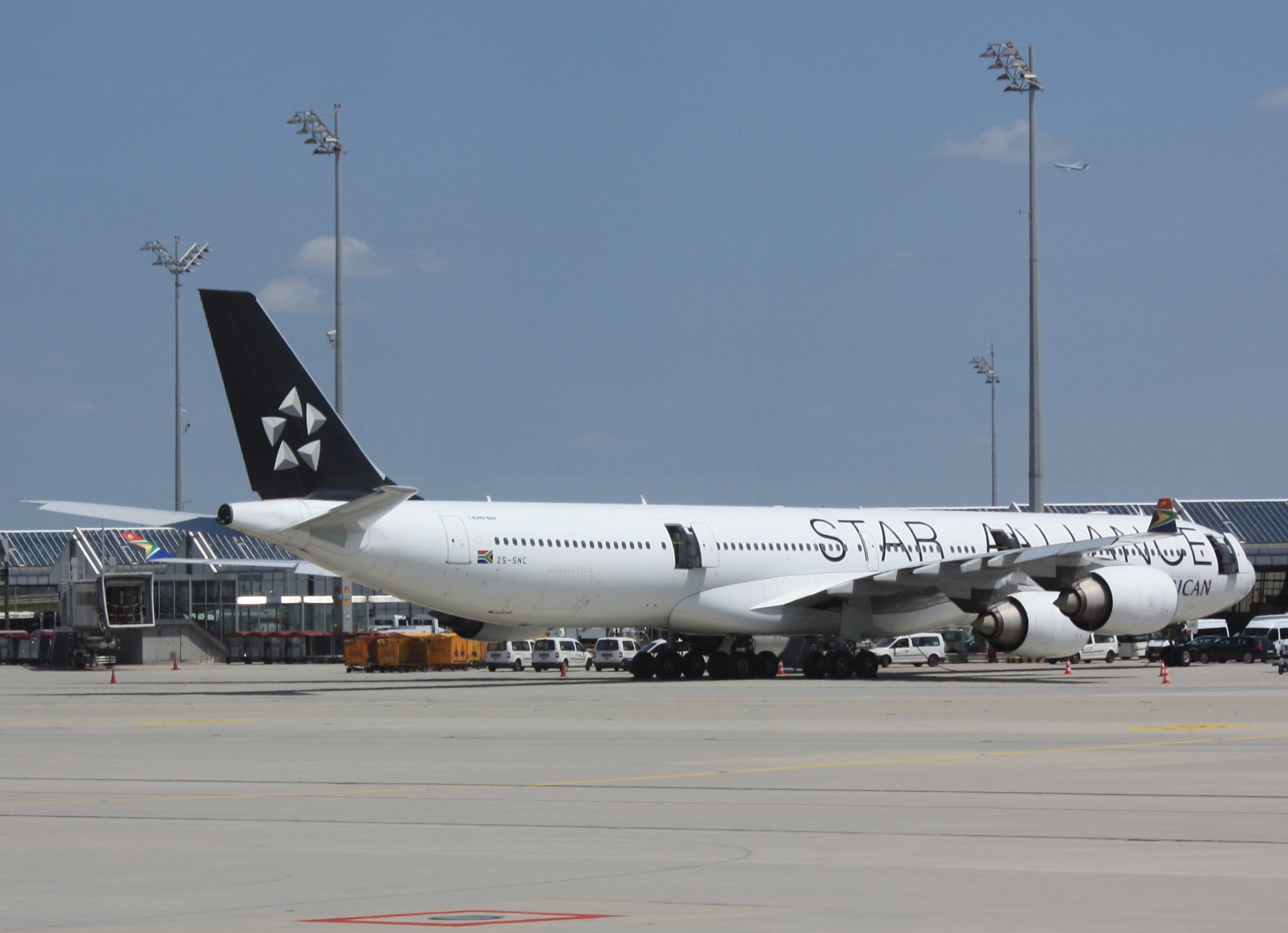 ZS-SNC South African A340-600 am Flughafen München